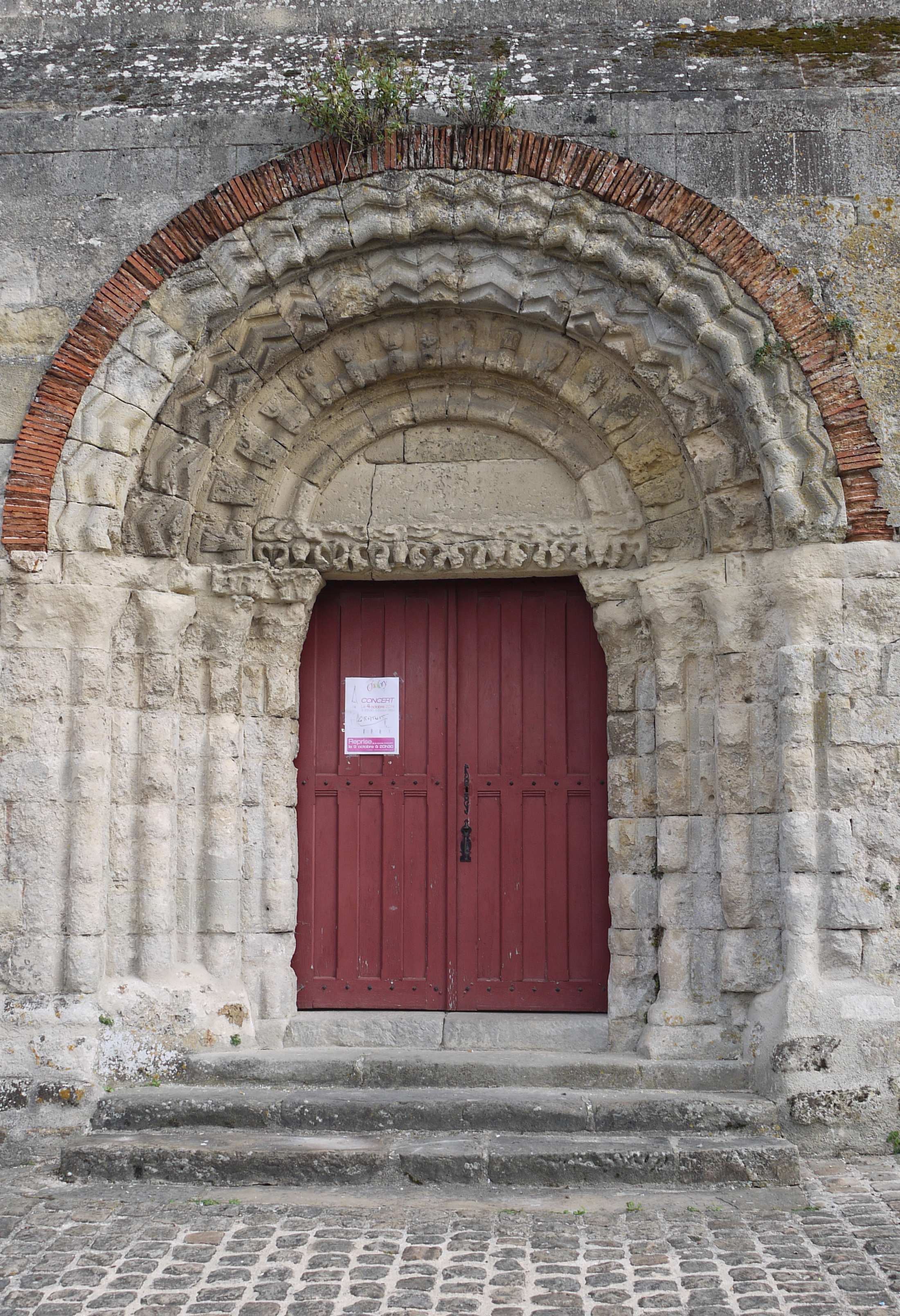 Porche de l'église Saint-Médard d'Epaux-Bézu